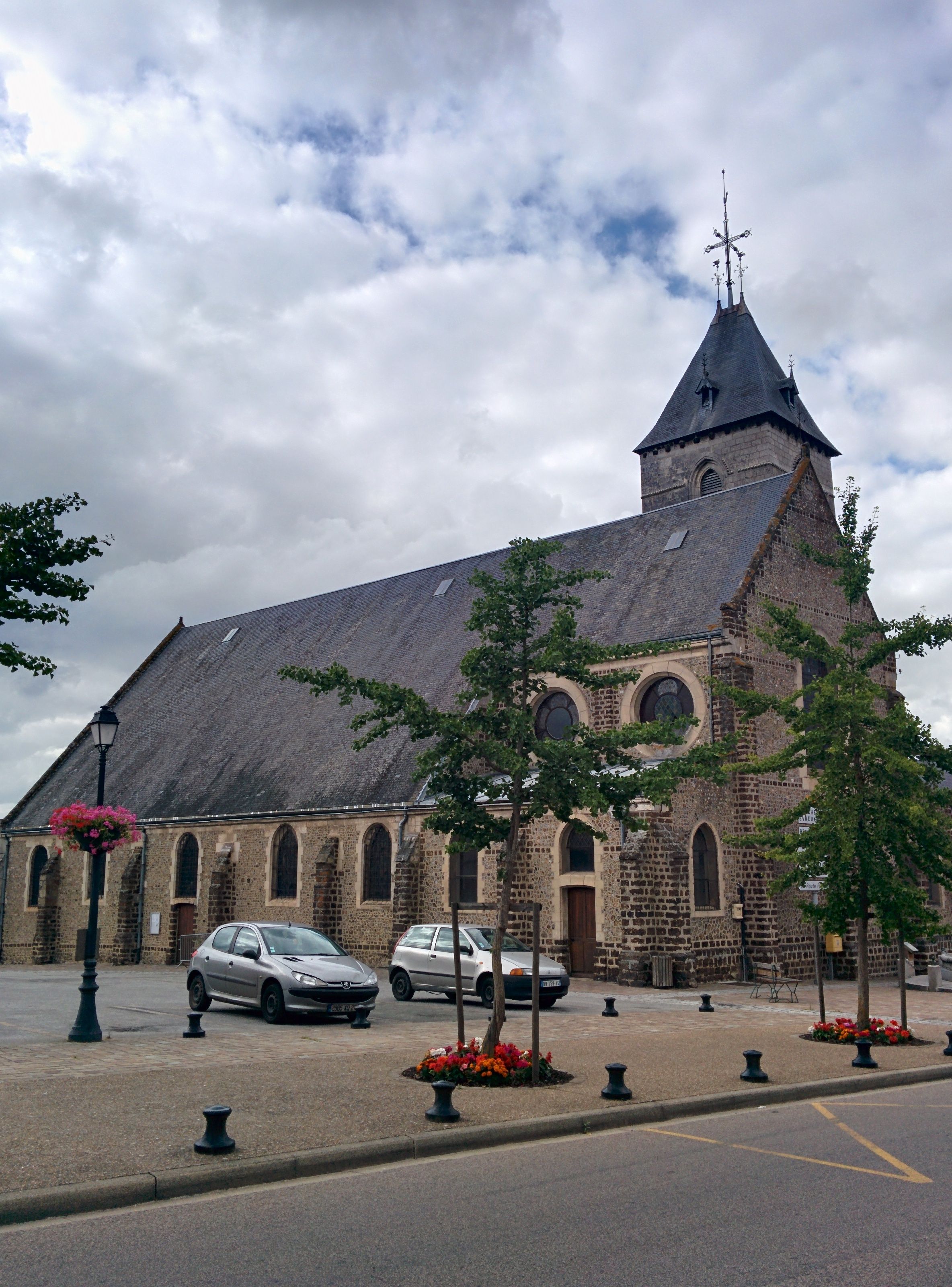 Église Saint-Gilles et place de l'église, commune de La Neuve Lyre (27330).